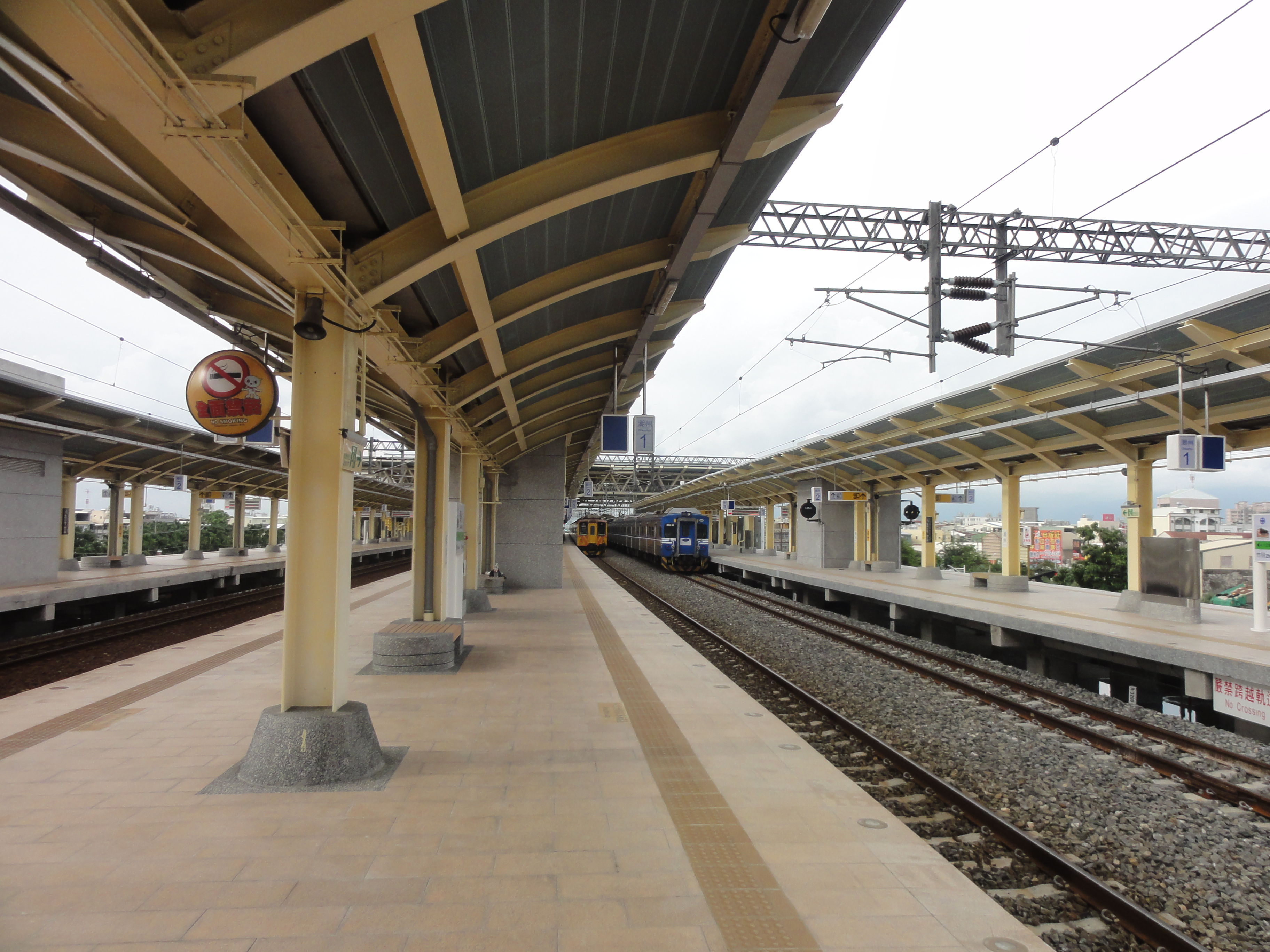 潮州車站月台